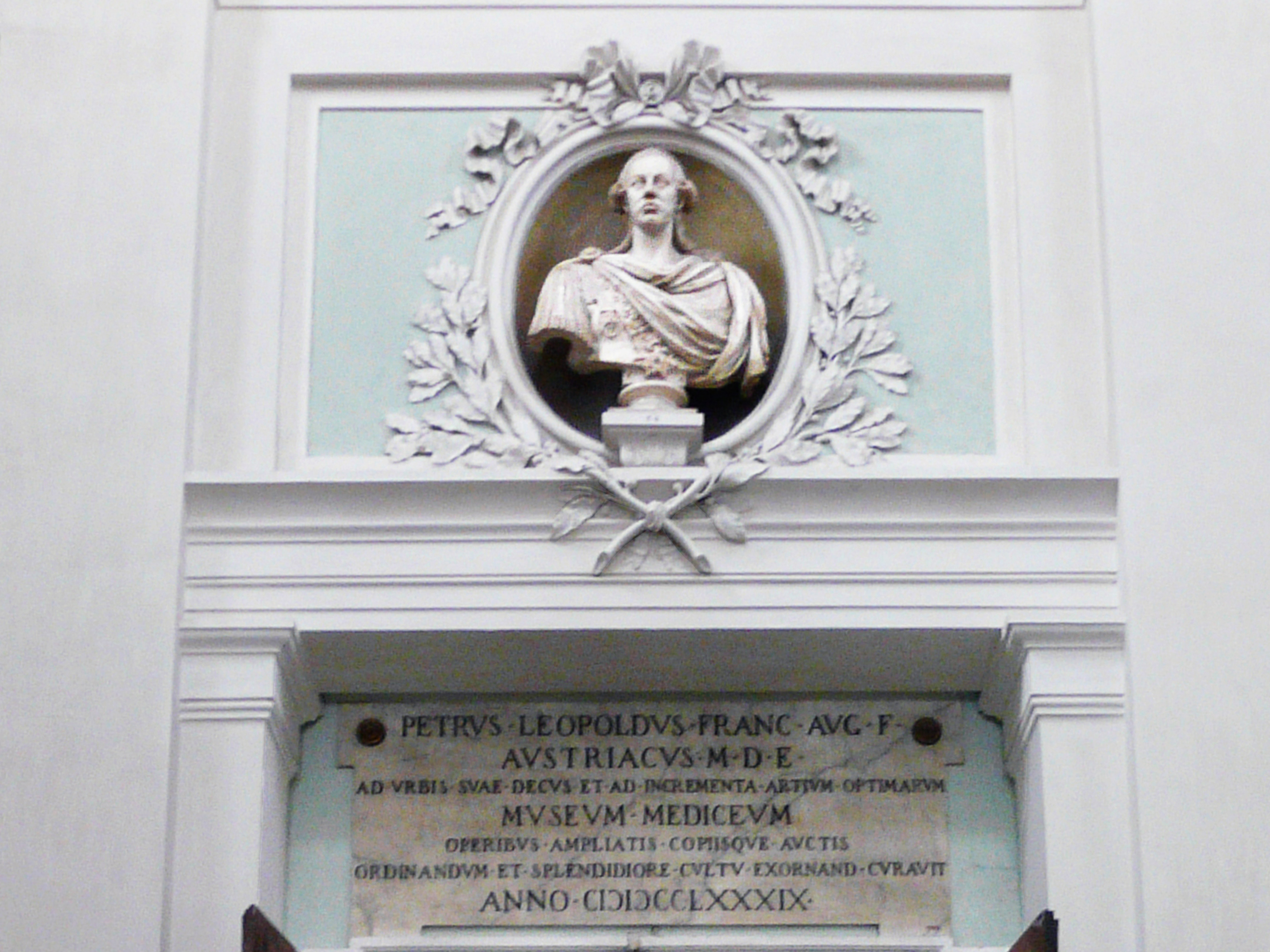 Бюст Петра Леопольда